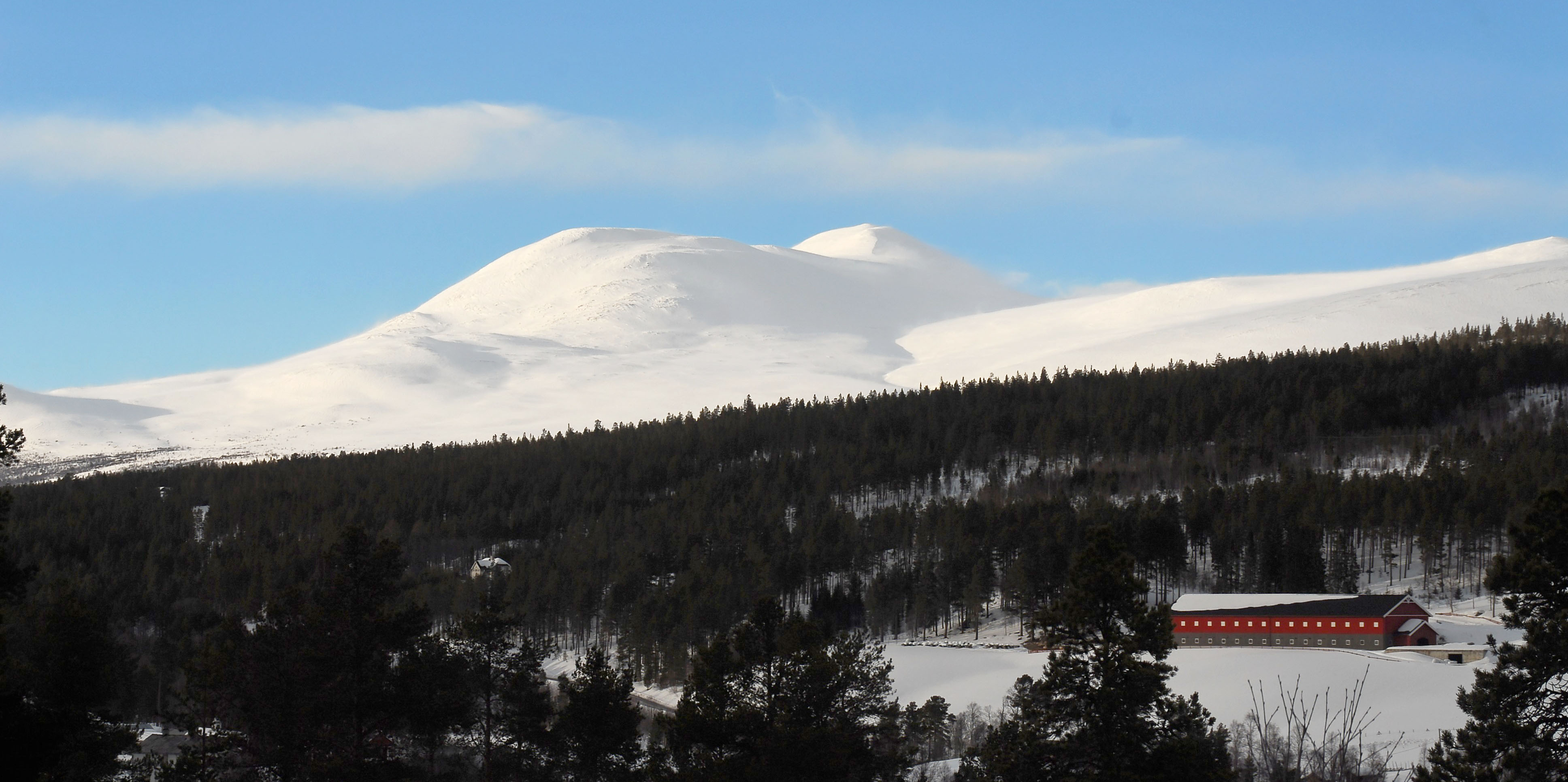 Gravskardhøgda sett fra riksvei 27Unknown gravskardhøgda as seen from hw. 27